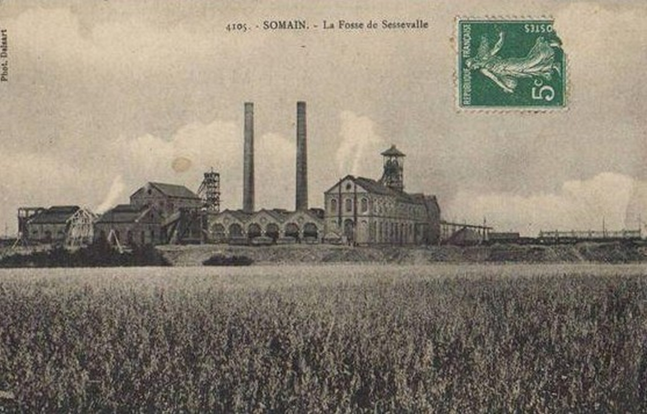 La fosse De Sessevalle était une mine souterraine de houille exploitée par la Compagnie des mines d'Aniche, puis par le Groupe de Douai au nord de Somain, près de Rieulay, dans le bassin minier du Nord-Pas-de-Calais, en France. Cette image présente une vue d'ensemble de la fosse, où l'on peut apercevoir que le chevalement du puits n° 2 est en cours de construction, ce qui permet de dater la photographie aux environs de 1908.